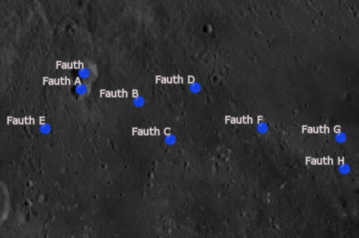 Cráter lunar Fauth. Cráteres satélite. (Imagen LRO)